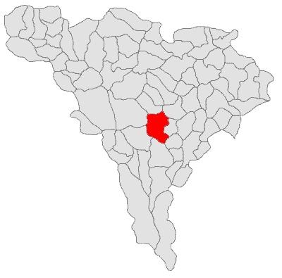 Categorie:Hărţi ale judeţului Alba